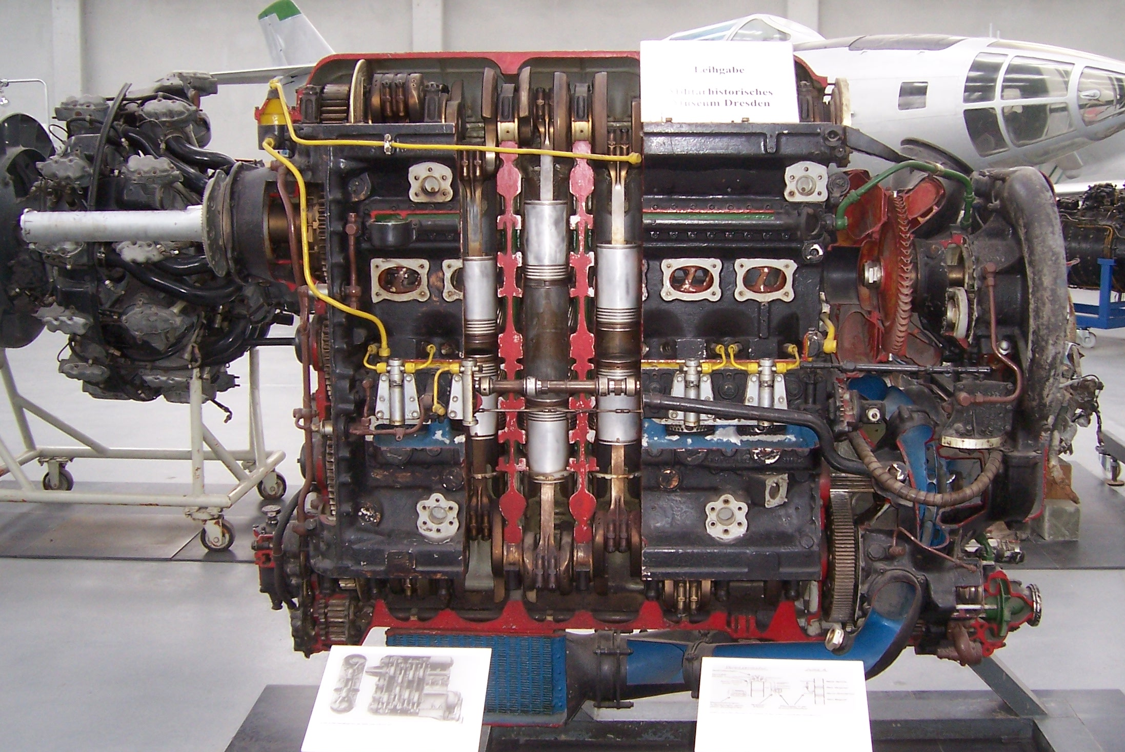 Jumo 207 im Technikmuseum Hugo Junkers Dessau 2010-08-06